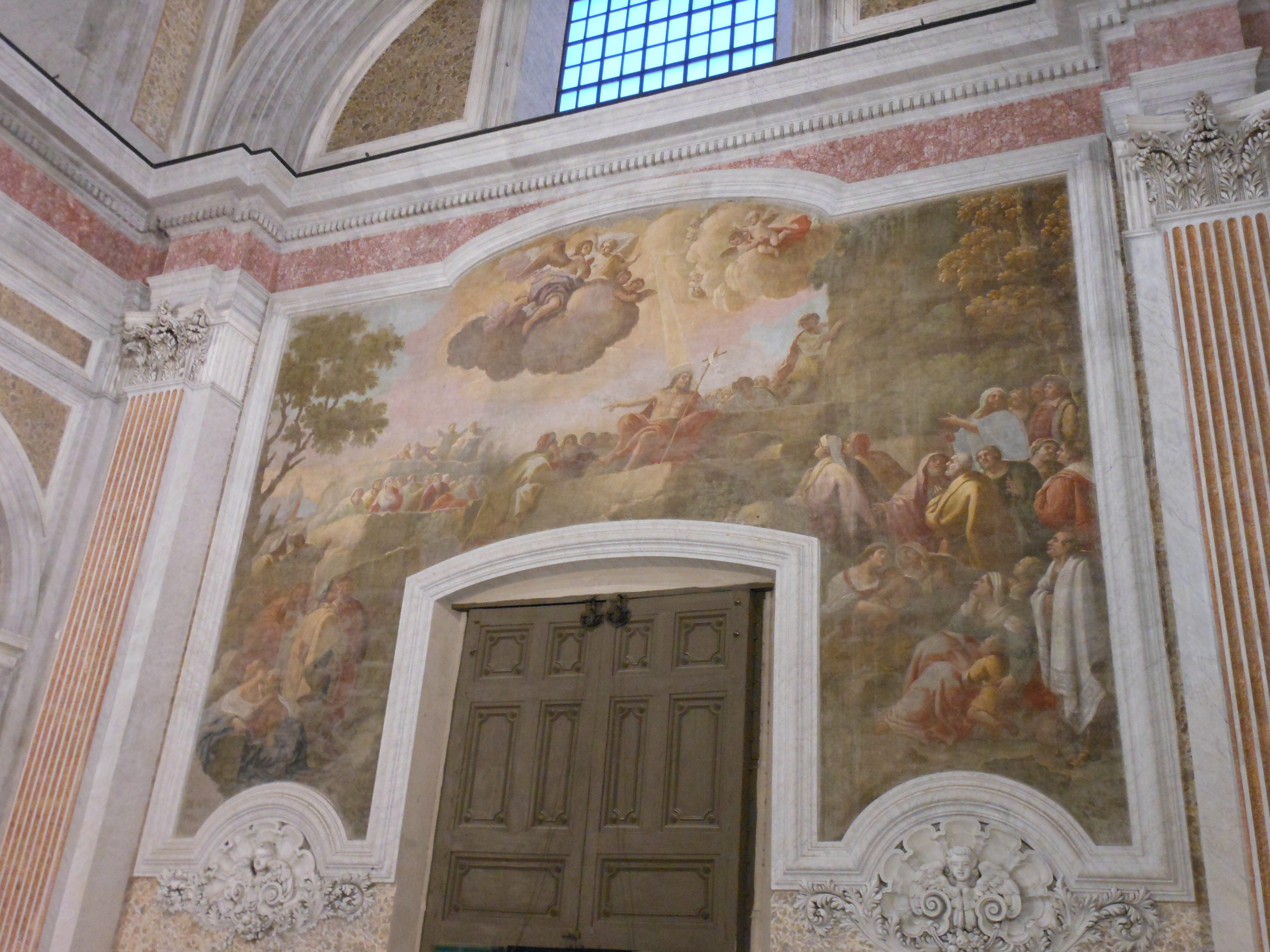 Controfacciata con affresco di Giuseppe De Vivo della chiesa di San Giovanni Maggiore a Napoli